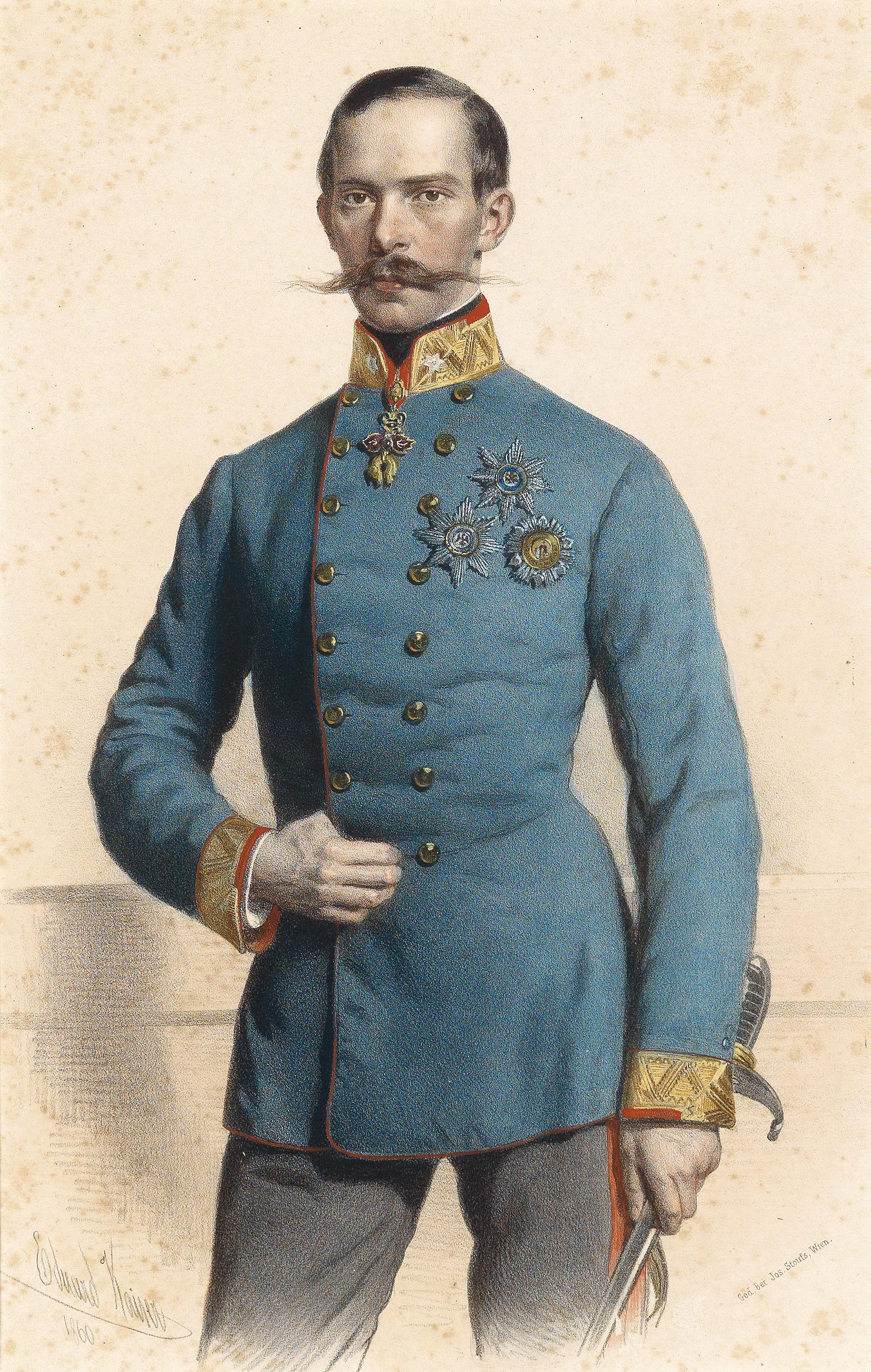 Erzherzog Rainer von Österreich im hechtgrauen Campagne-Waffenrock mit der Generalmajorsdistinktion und mit Ordensdekoration (u.a. der Halsorden vom Goldenen Vlies), Säbel und schwarzer Generalshose mit scharlachroten Lampassen.